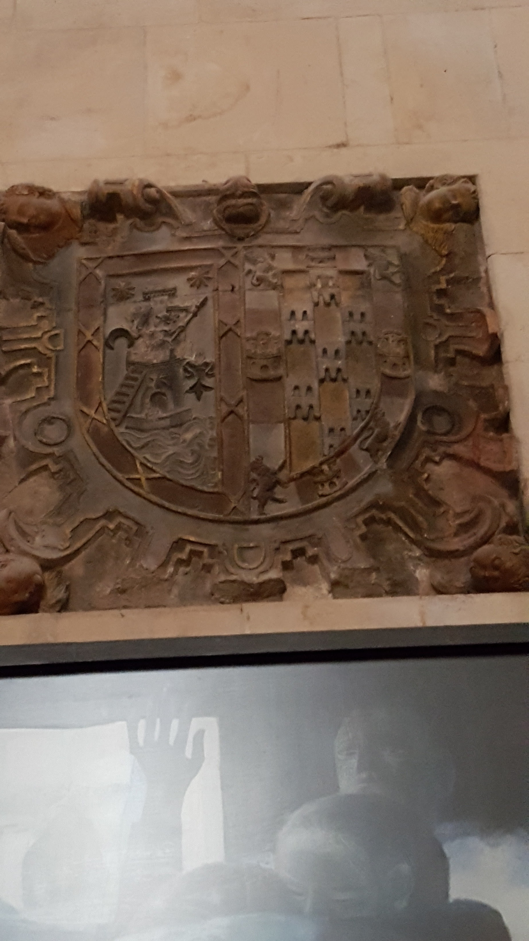 Escudo de Armas de la Familia Escalada ubicado en la pared de la Capilla